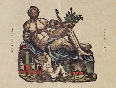 Allegoria philosophiæ Tychonis, impressa in ultima pagina libri sui de Astronomiæ instauratæ Mechanica